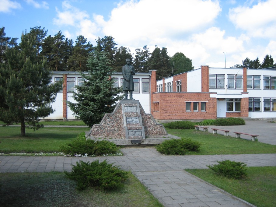 Nemunaitis (Alytaus rajonas). Centrinė aikštė. Paminklas žuvusiems už Nepriklausomybę .